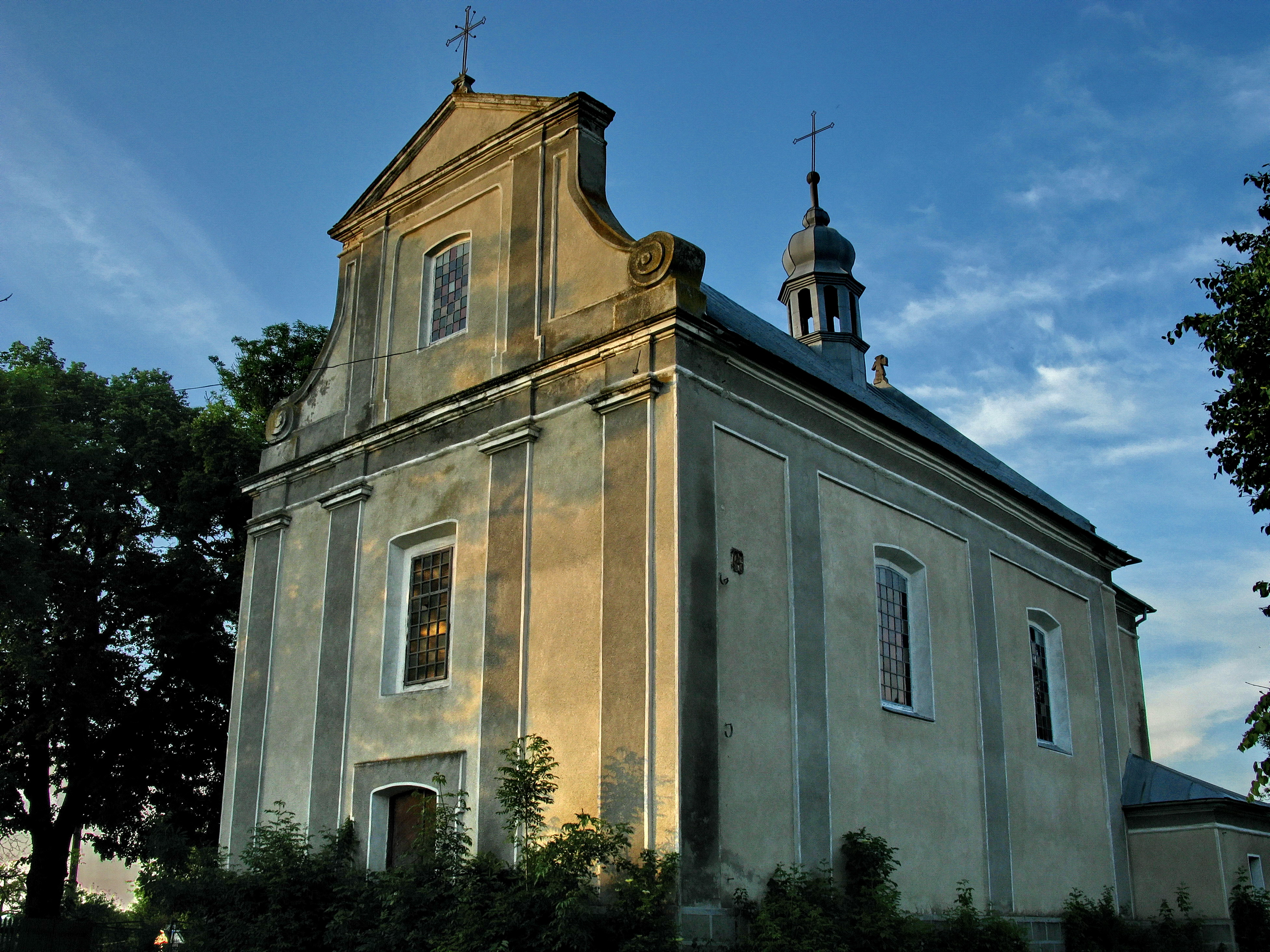 Костел(мур.), Товсте